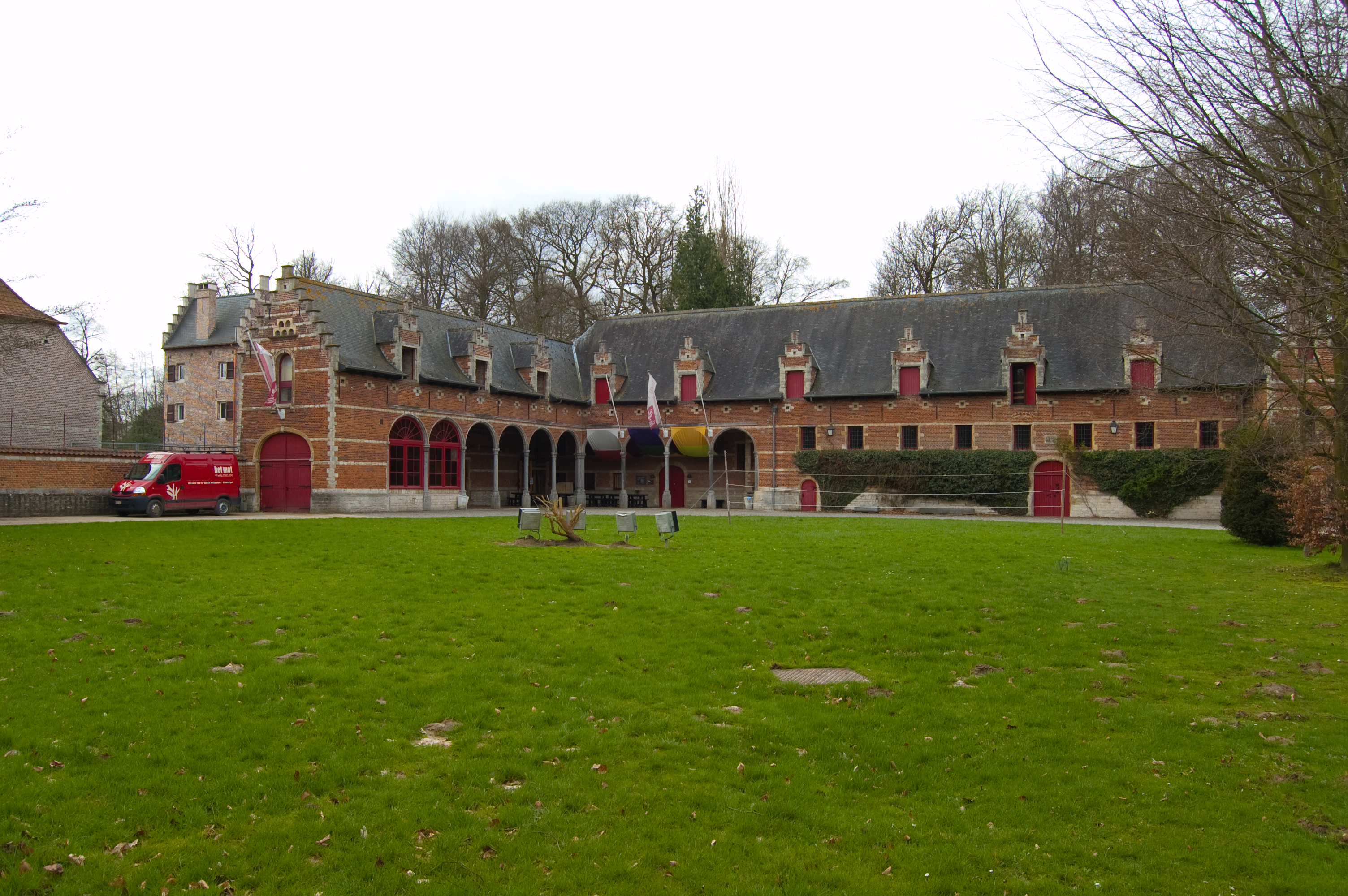 Guldendal